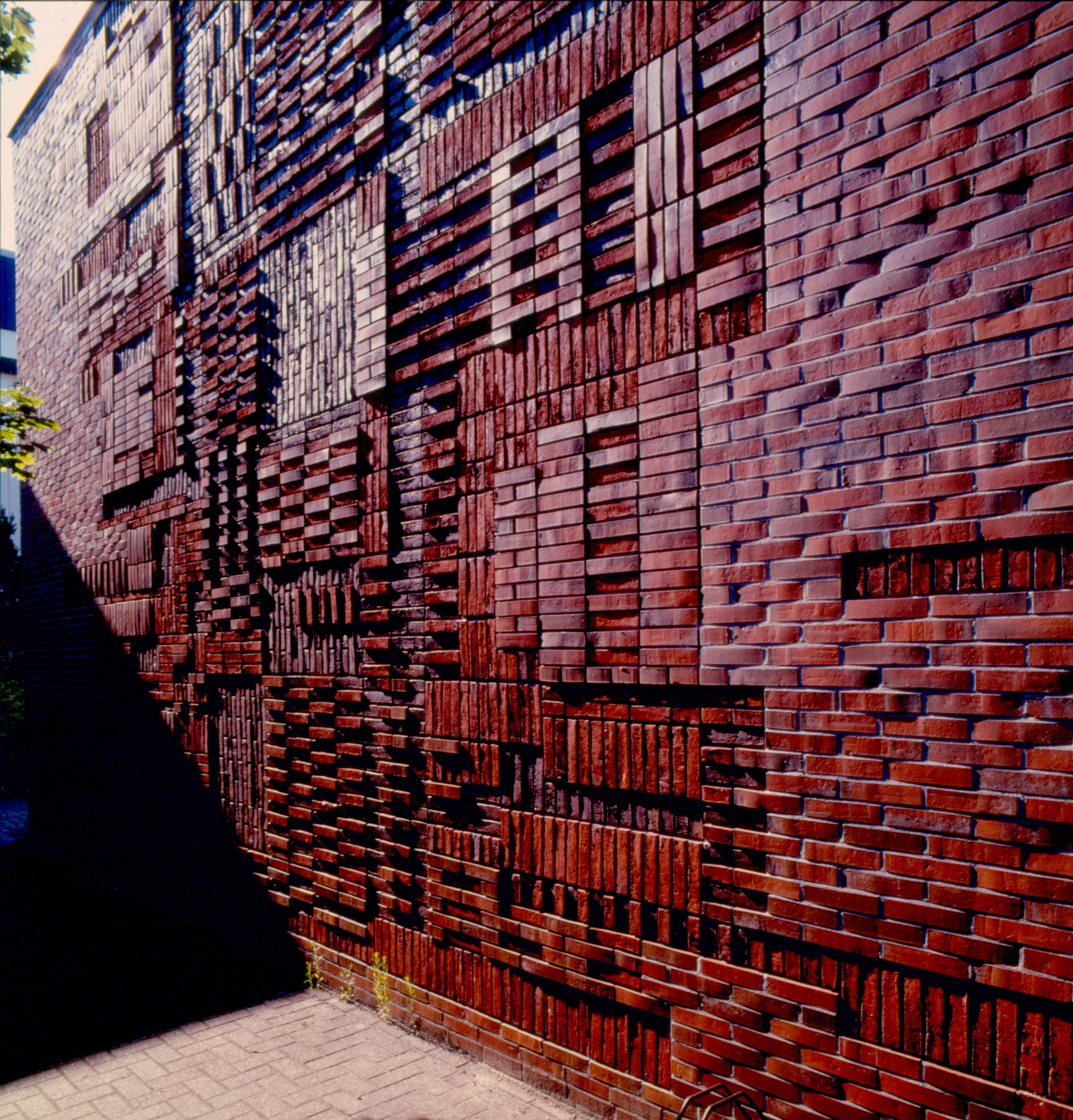 Georg Schmidt-Westerstede: Relief aus Klinkern an der Fassade einer Turnhalle (6,60 x 7,75 m). Schule am Bürgerbusch, Oldenburg (Oldenburg), Eßkamp 126. Wv-Nr. 2333, 1975.